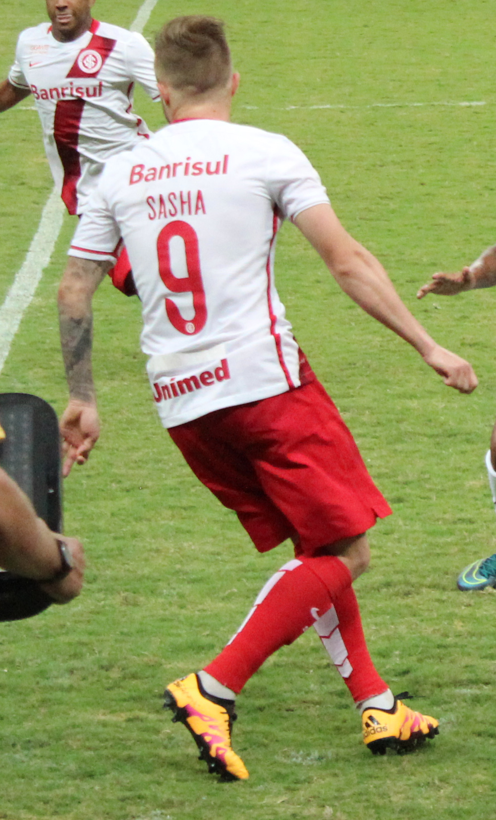 Eduardo Sasha na partida Fluminense x Internacional, semifinal Primeira Liga, Estádio Nacional Mané Garrincha, Brasília (DF), Brasil.